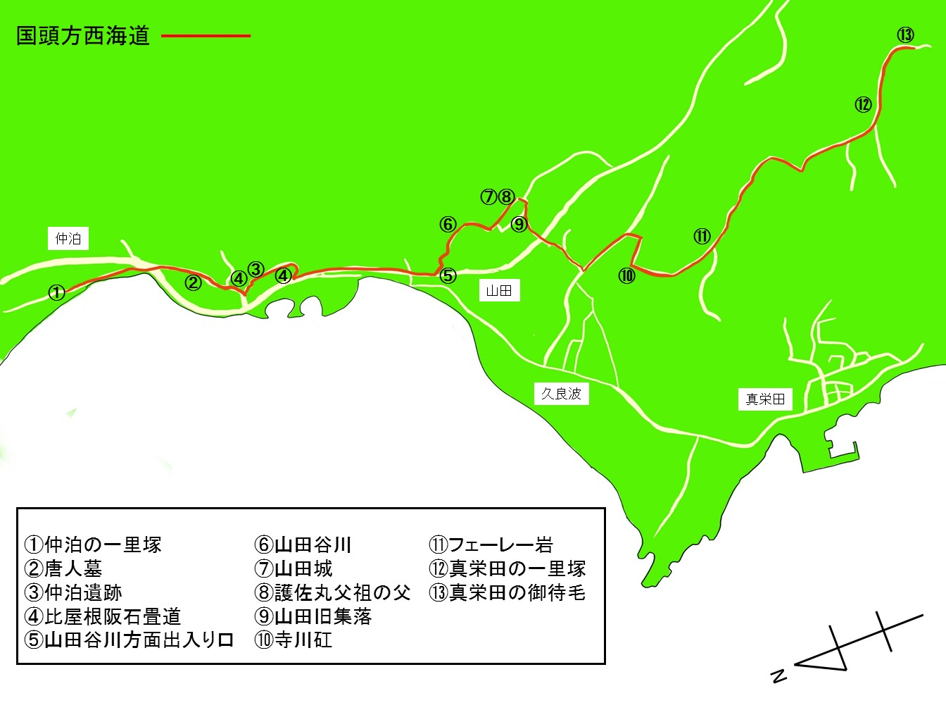 『国指定史跡 歴史の道「国頭方西海道」』を本に作成を行った。